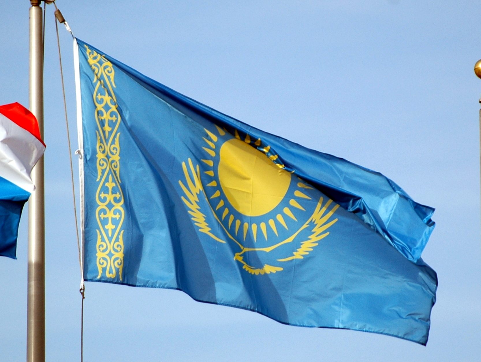 Flagge Kasachstans